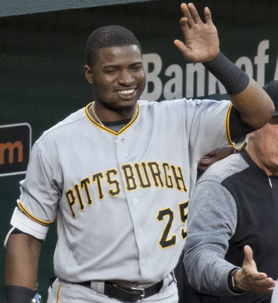 Pirates at Orioles 6/7/17